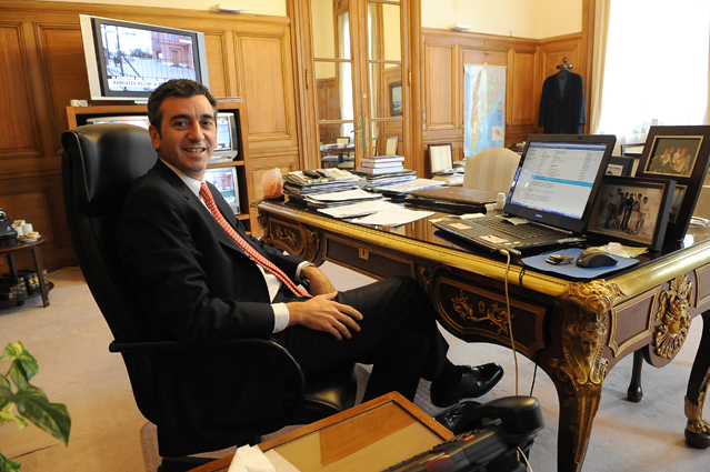 El ministro del Interior, Florencio Randazzo, en su despacho de Casa de Gobierno.